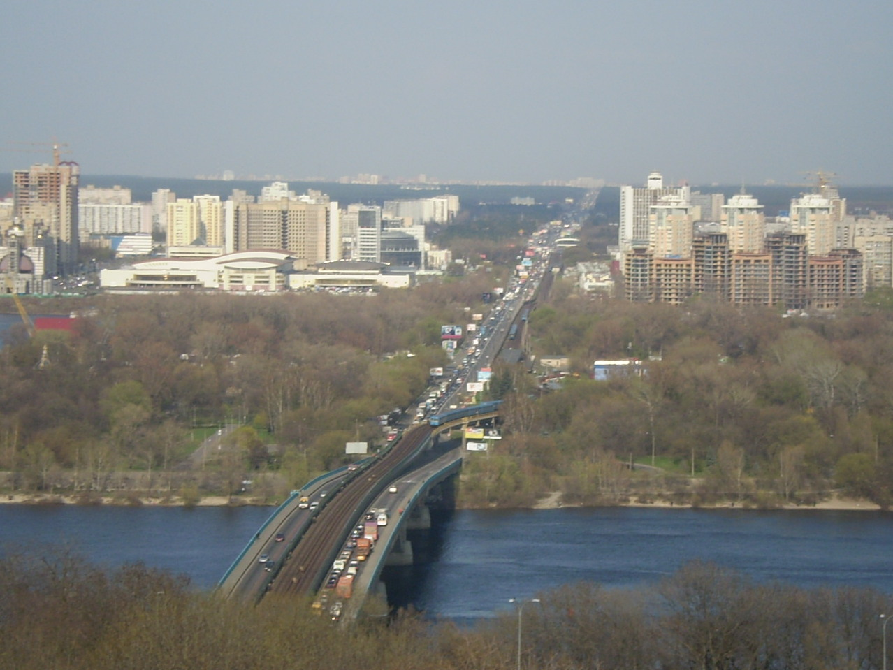 Панорама на лівий берег та міст метро з правого берегу Дніпра. На горизонті - Бровари.